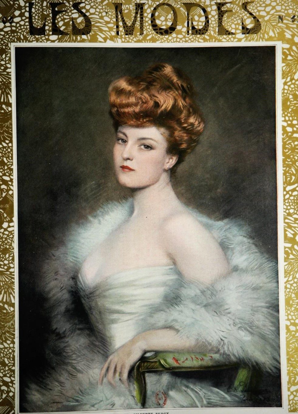 Portrait de Gilberte Sergy, par Clemens von Pausinger, 1904. (Les Modes : revue mensuelle illustrée des Arts décoratifs appliqués)